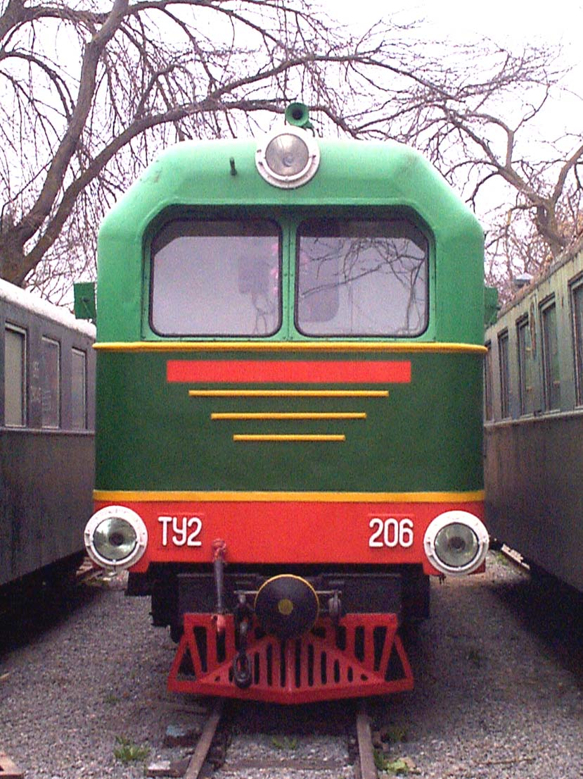 tu2-206new